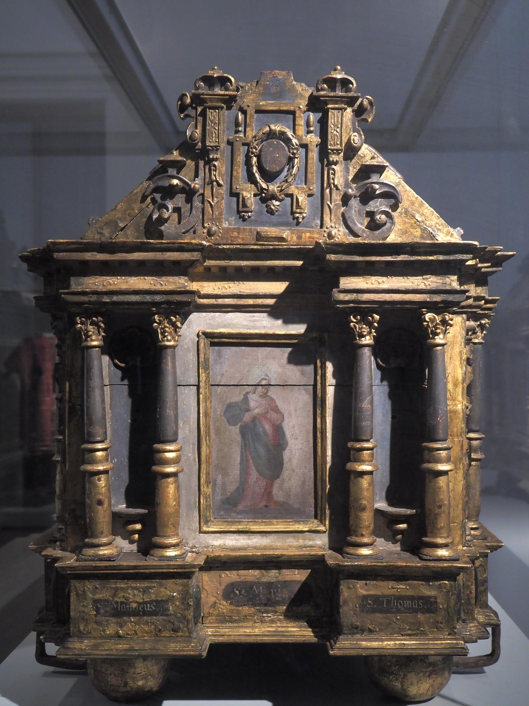 Corvey (Germany – NRW), Basilika St. Stephanus und St. Vitus, Vitusschrein (2016)